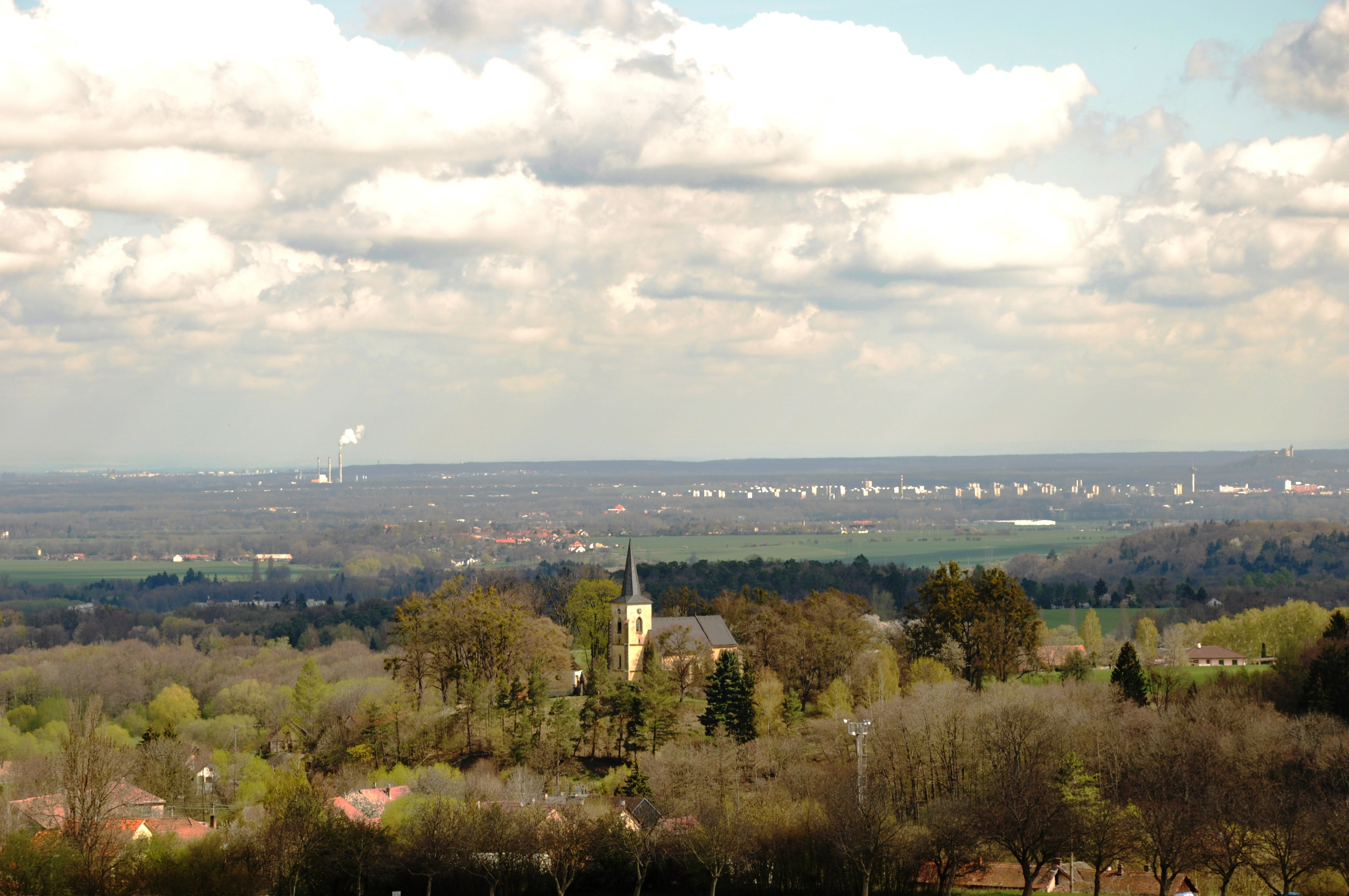 Kostel sv. Petra a Pavla (Kostelec u Heřmanova Městce), Kostelec u Heřmanova Městce